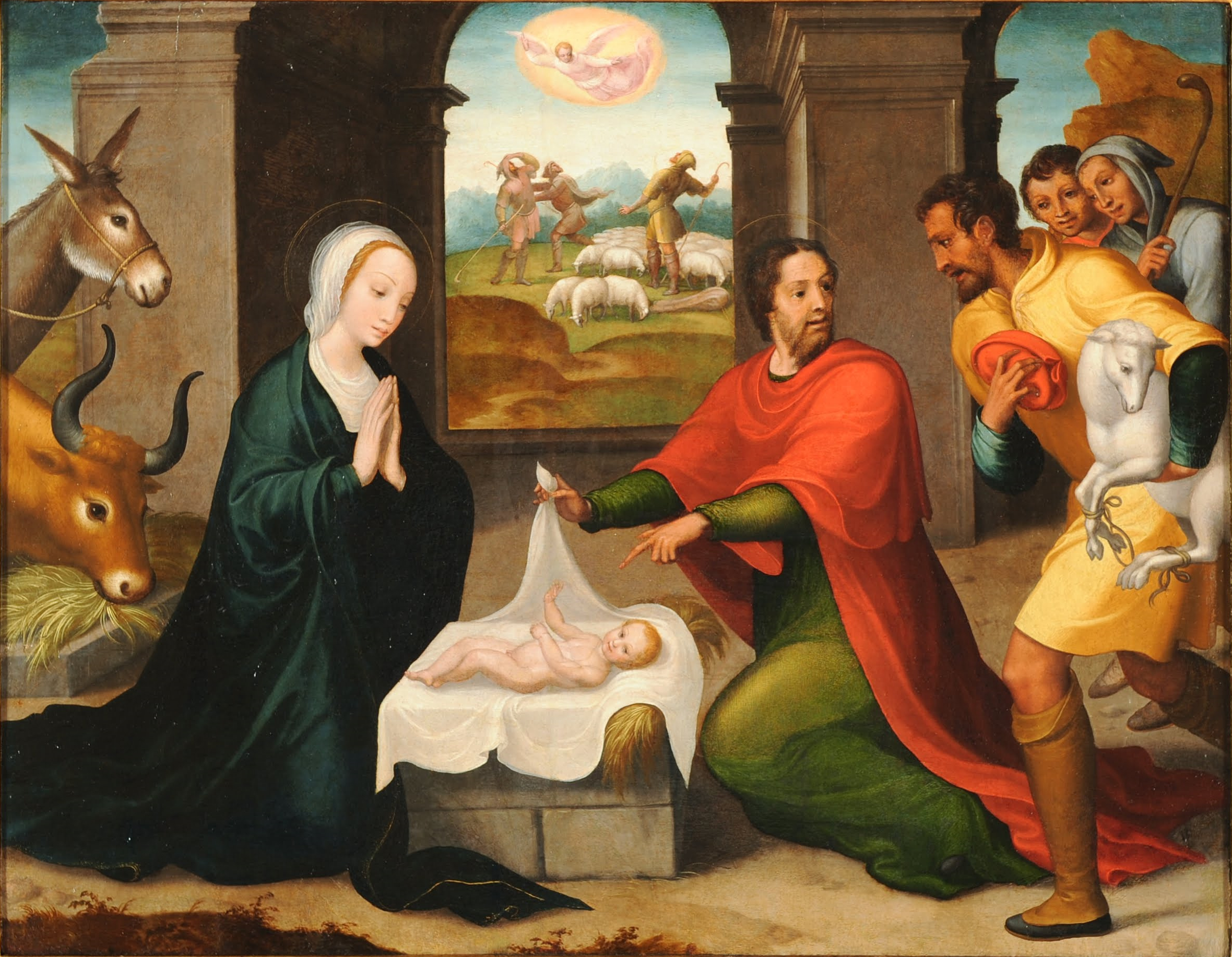 La obra representa el momento en que el Niño Jesús fue adorado por los pastores de Belén poco después de su nacimiento.